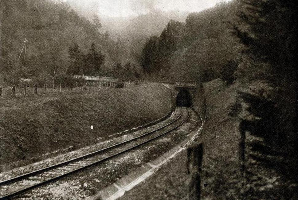 Eingang zum Rickentunnel, Kaltbrunner Seite